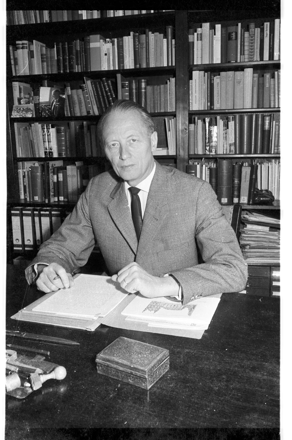 Professor für Neuere Geschichte an der Christian-Albrechts-Universität (CAU).